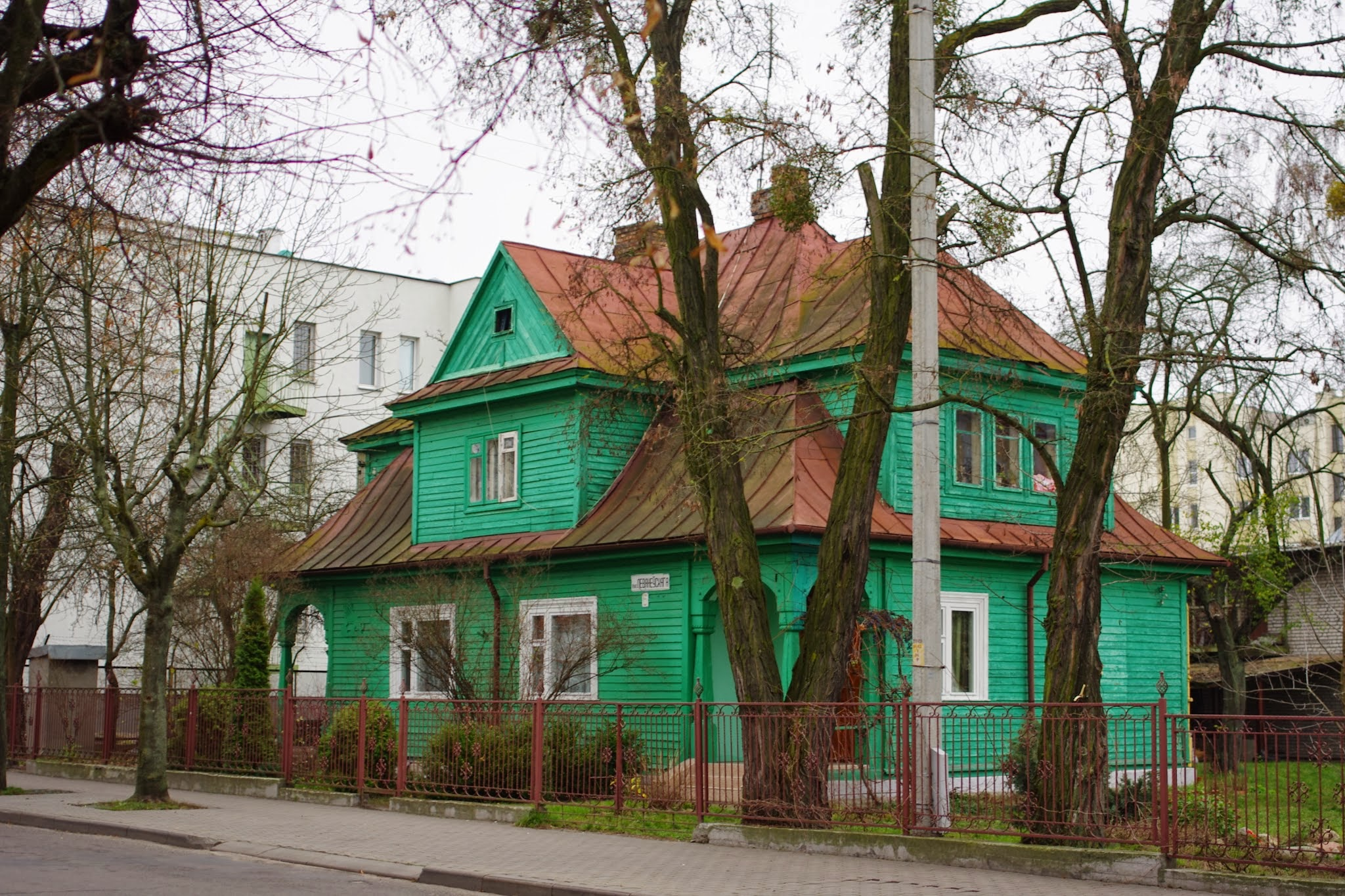 Lieninski rajon, Brest, Belarus